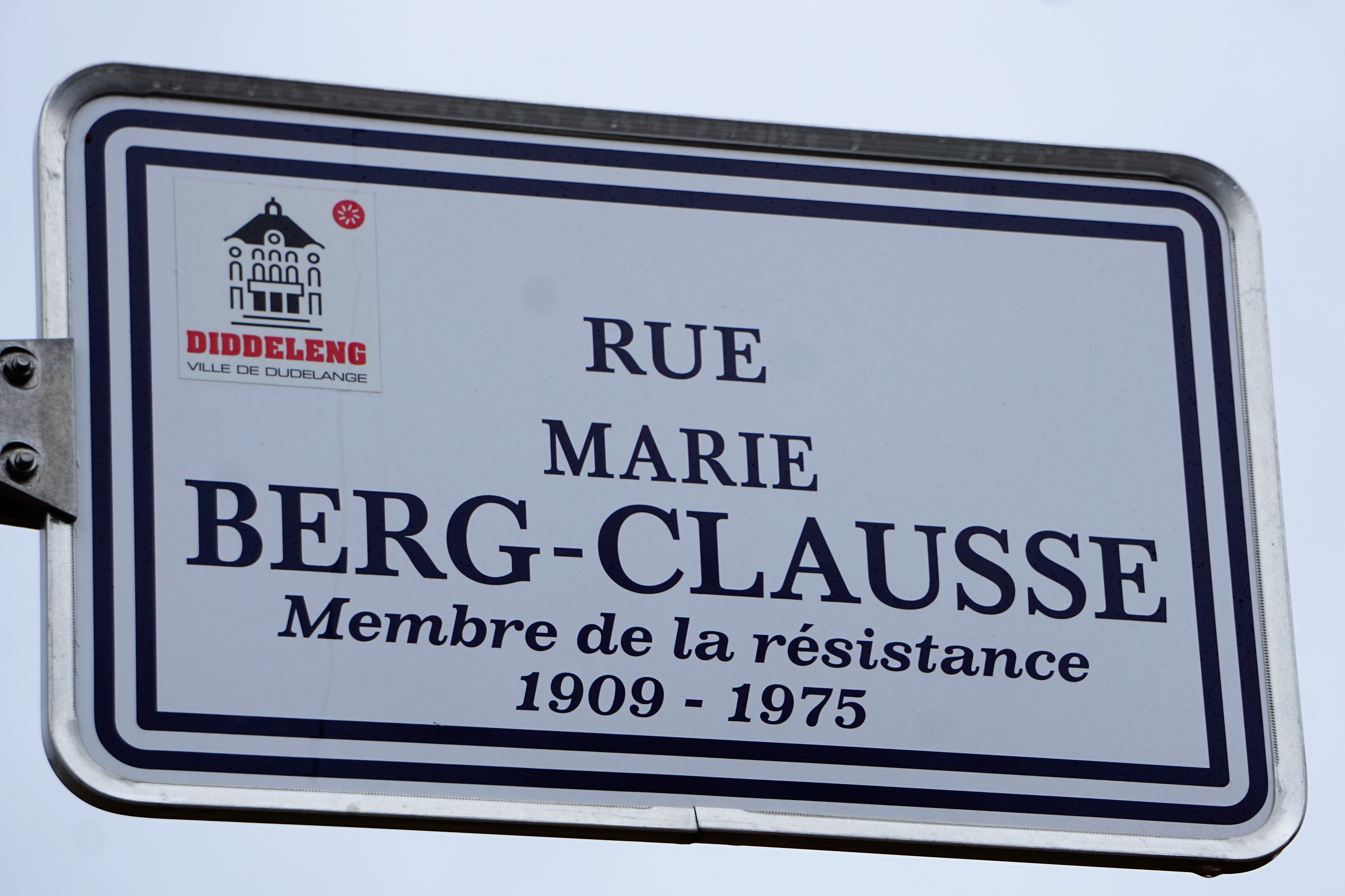 Plaque de nom de rue à Dudelange, quartier Lenkeschléi.